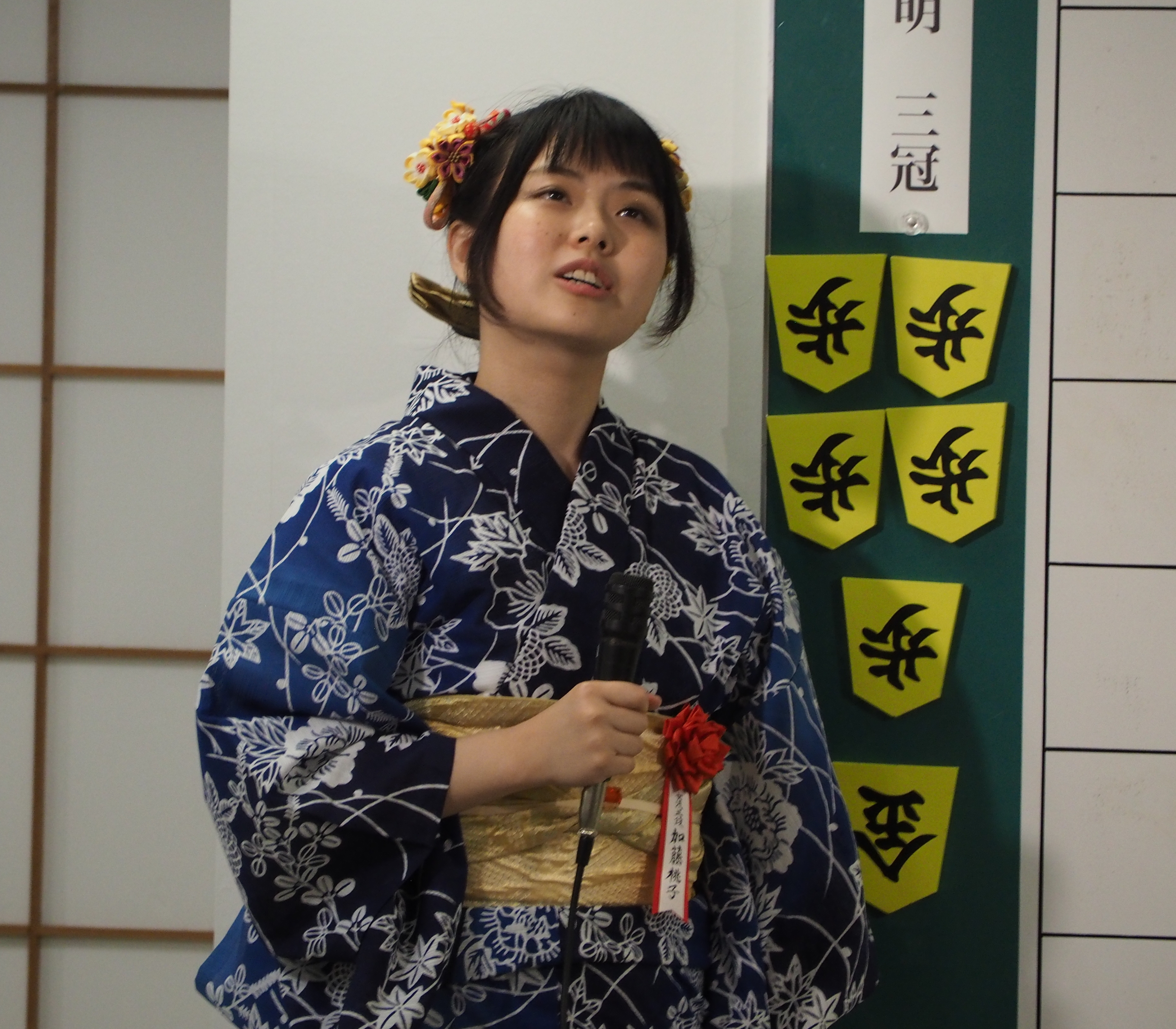 加藤桃子